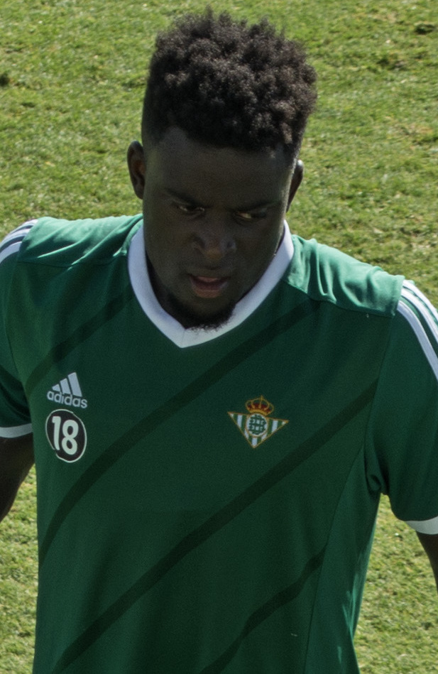 Alfred N'Diaye, futbolista del Real Betis en 2015, durante un entrenamiento en la ciudad deportiva Luis del Sol.